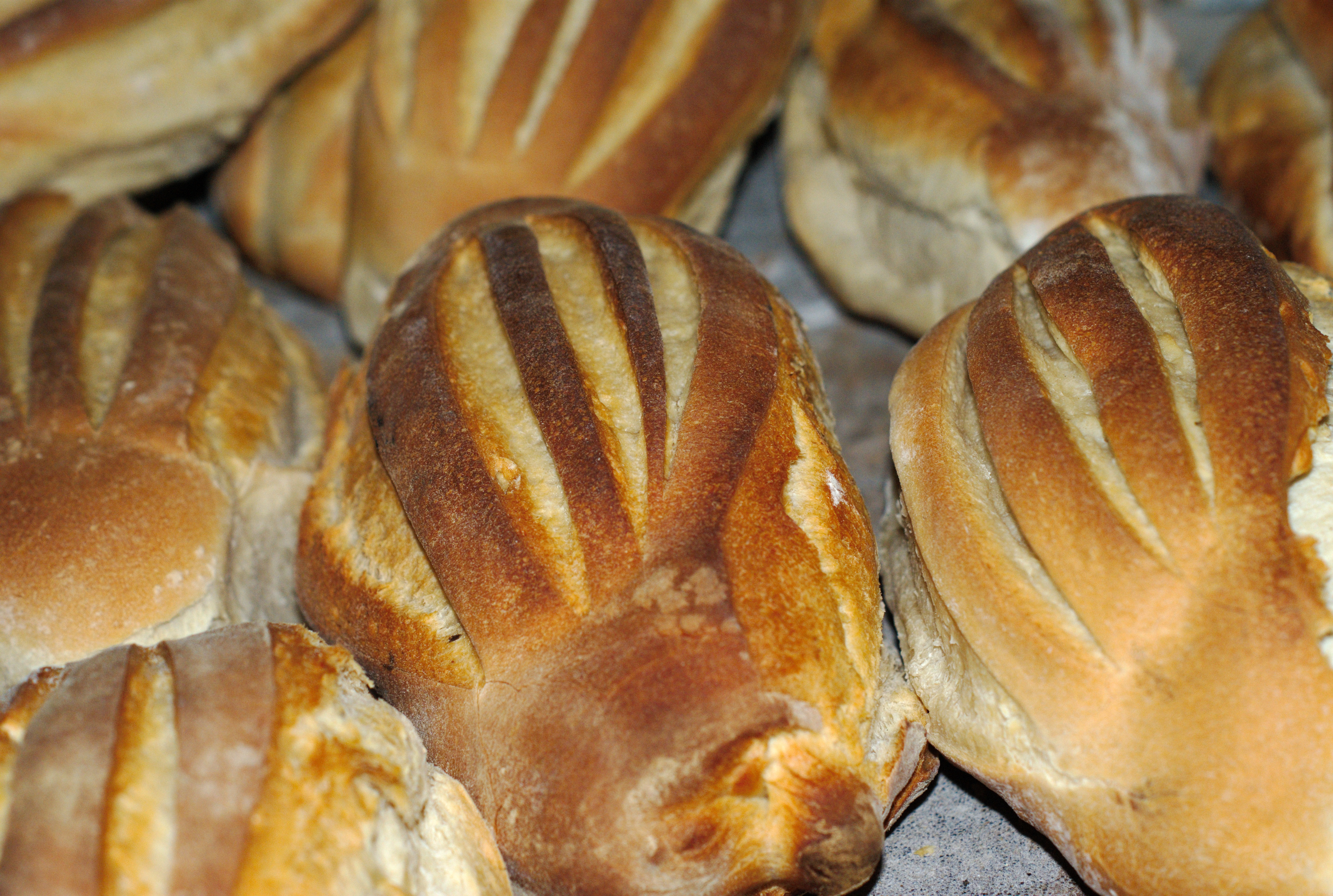 Pains briés fabriqués artisanalement au four banal de la Pannevert par le Centre d’Histoire Sociale de Haute-Normandie